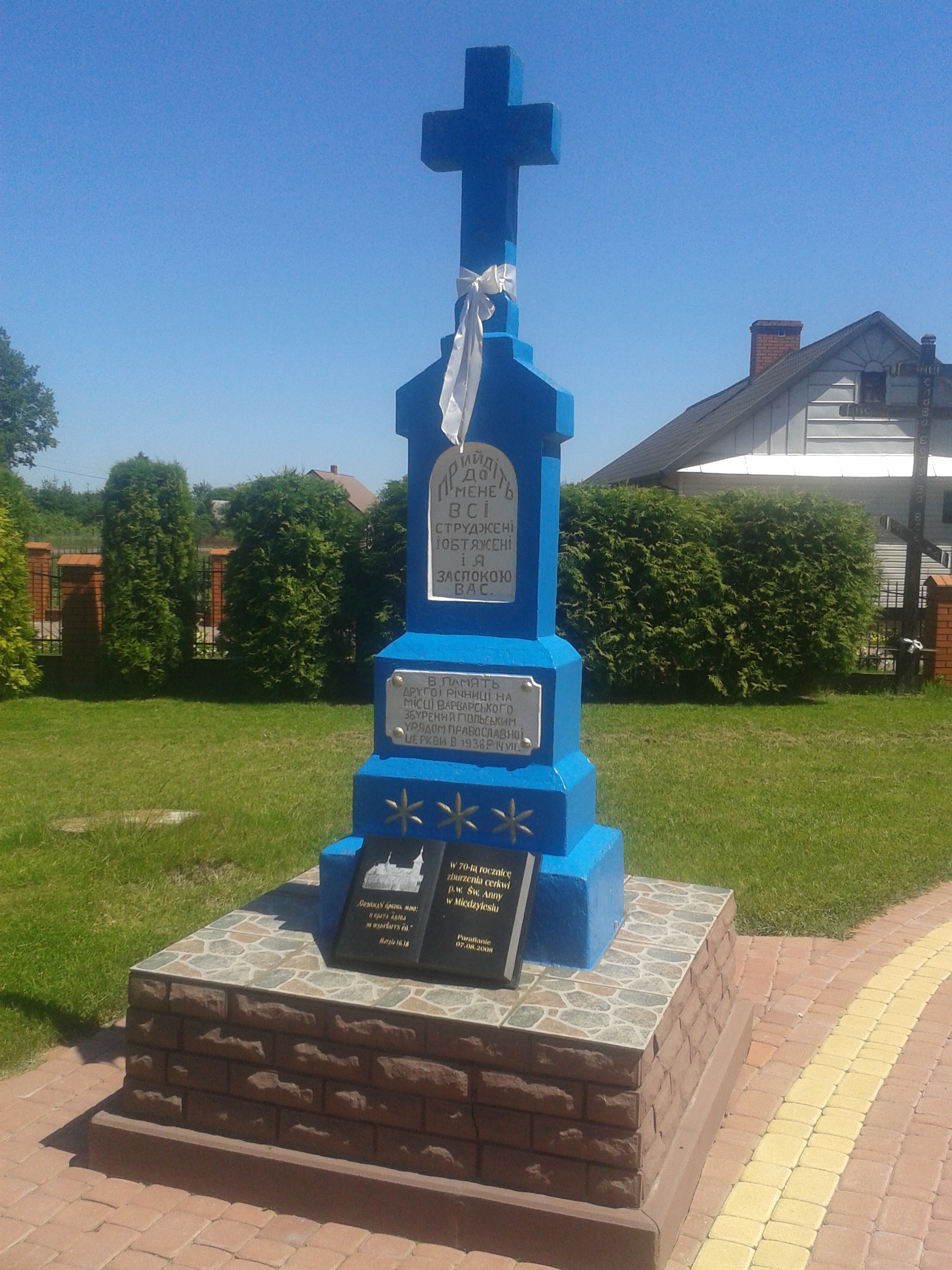 Pomnik upamiętniający zniszczenie w 1938 r. cerkwi św. Anny w Międzylesiu, w sąsiedztwie nowej świątyni